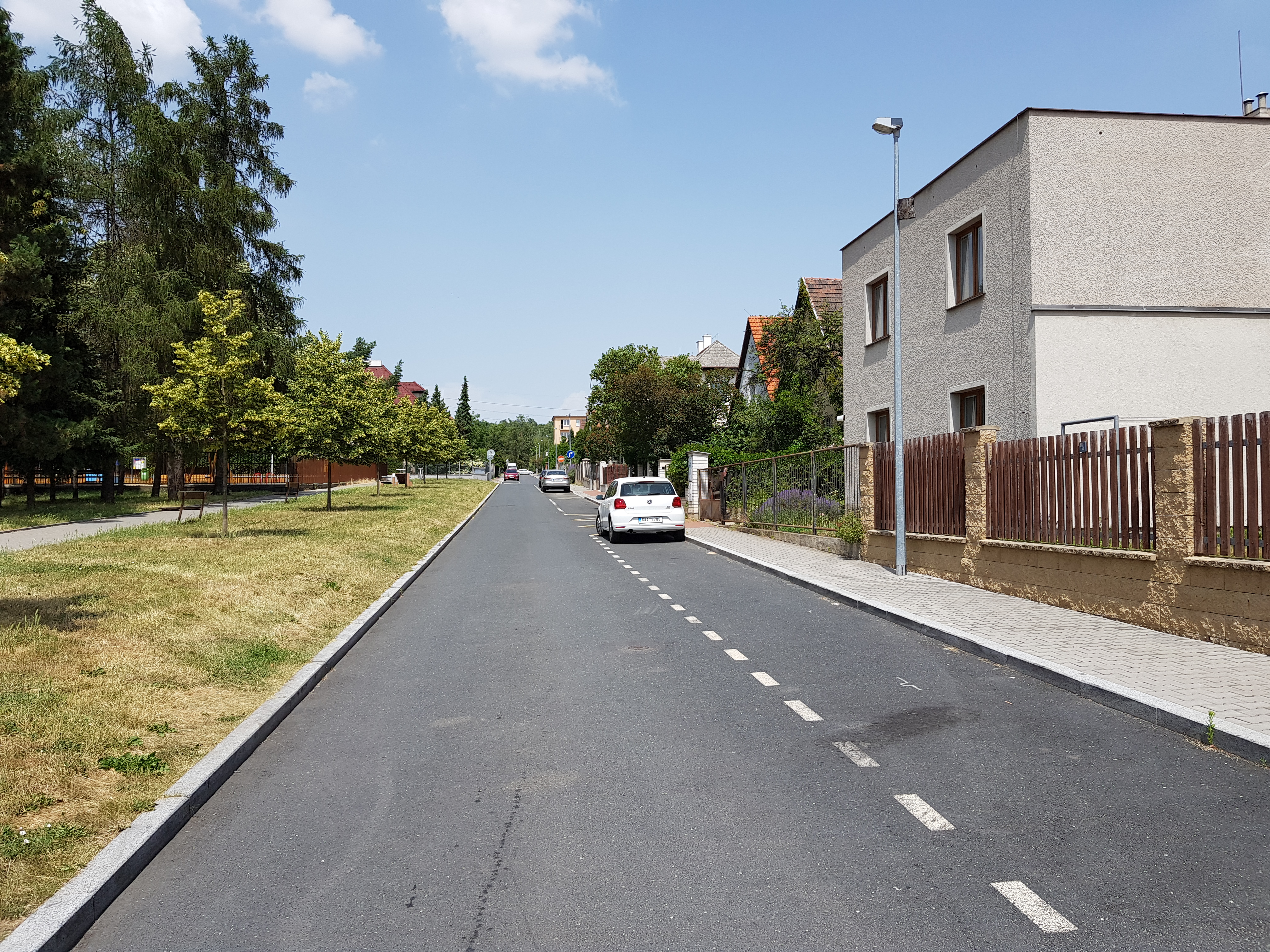 Ulice V Humenci v Praze-Hloubětíně